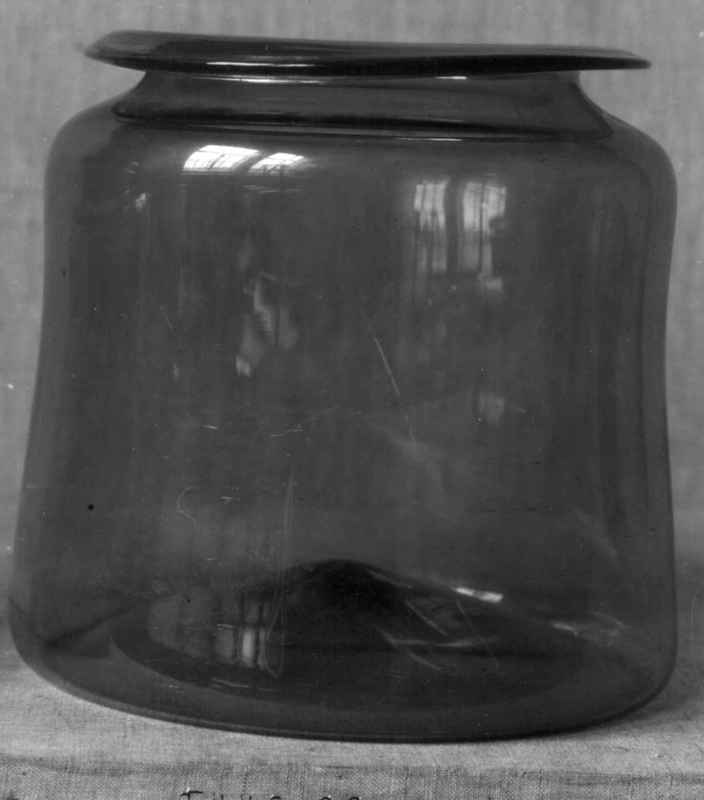 Syltetøykrukke i grønnlig glass. Antakelig laget på Nøstetangen glassverk omkring 1760. Diam. 26 cm. Foto Norsk Folkemuseum, NF.1929-0445.